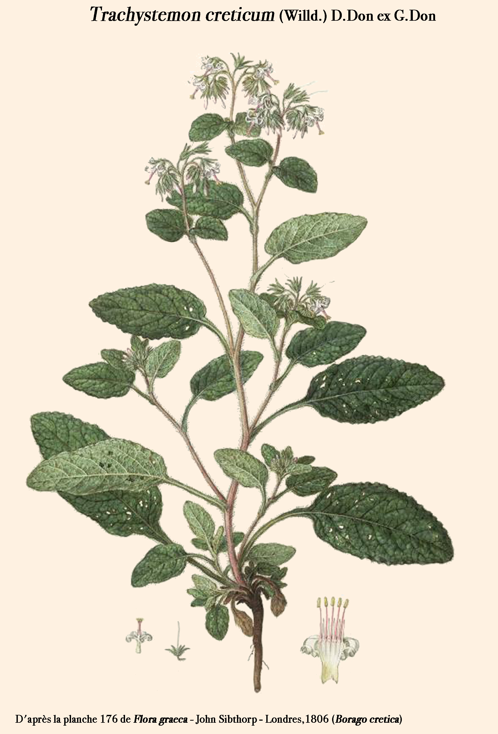 Trachystemon creticum (Borago cretica) - Planche 176 de Flora graeca de John Stibthorp - Londres, 1806 - reprise par D. Prévôt References to determine valid name: NCBI link: Symphytum creticum The Plant List link: Borago cretica Willd. (Syn. Symphytum creticum (Willd.) Runemark) Considered a synonym (Source: KewGarden WCSP) The Plant List link: Symphytum creticum (Willd.) Runemark (Source: KewGarden WCSP) Tropicos link: Borago cretica Willd. (+ sub-taxa)